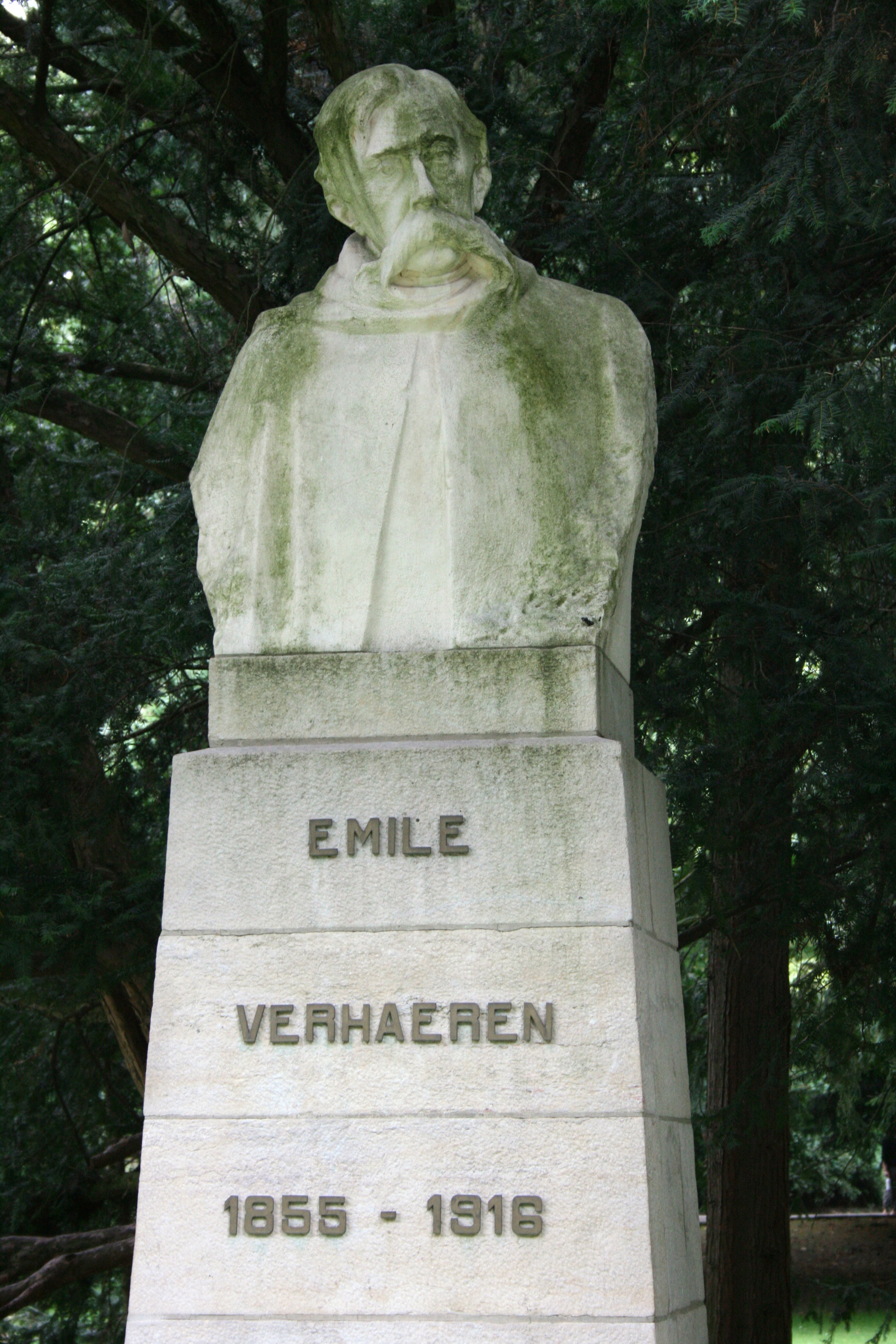 Josaphatpark, Schaarbeek (Brussel), België. Borstbeeld Emile Verhaeren door Louis Mascré